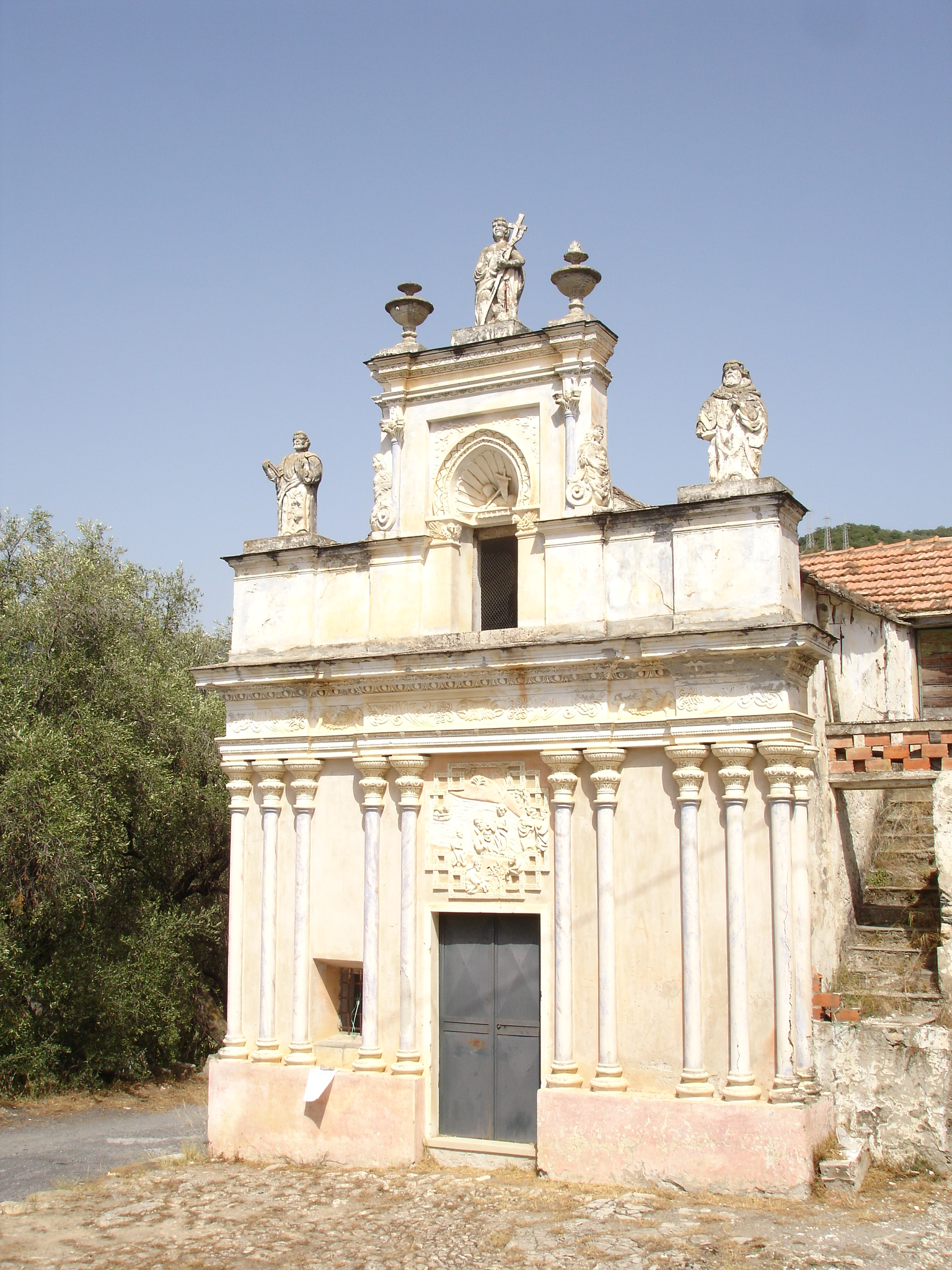 Oratorio di San Giovanni Battista in Diano Borganzo, commune of Diano San Pietro, province of Imperia, Italy